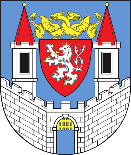 Aktuální podoba znaku města Kolína, která byla Radou města Kolína schválena 8. 8. 2011. Ztvárnil ji Stanislav Pokorný, umělecko-průmyslový výtvarník, heraldik, člen Unie výtvarných umělců ČR. Znak města Kolína je konstantou, která zosobňuje identitu města a odráží jeho historii. Je užíván v komunikaci města jako instituce, k reprezentačním účelům apod. Na jeho užití mají právo i občané města, nejde-li o užití ke komerčním účelům či propagace jejich podnikatelské činnosti.